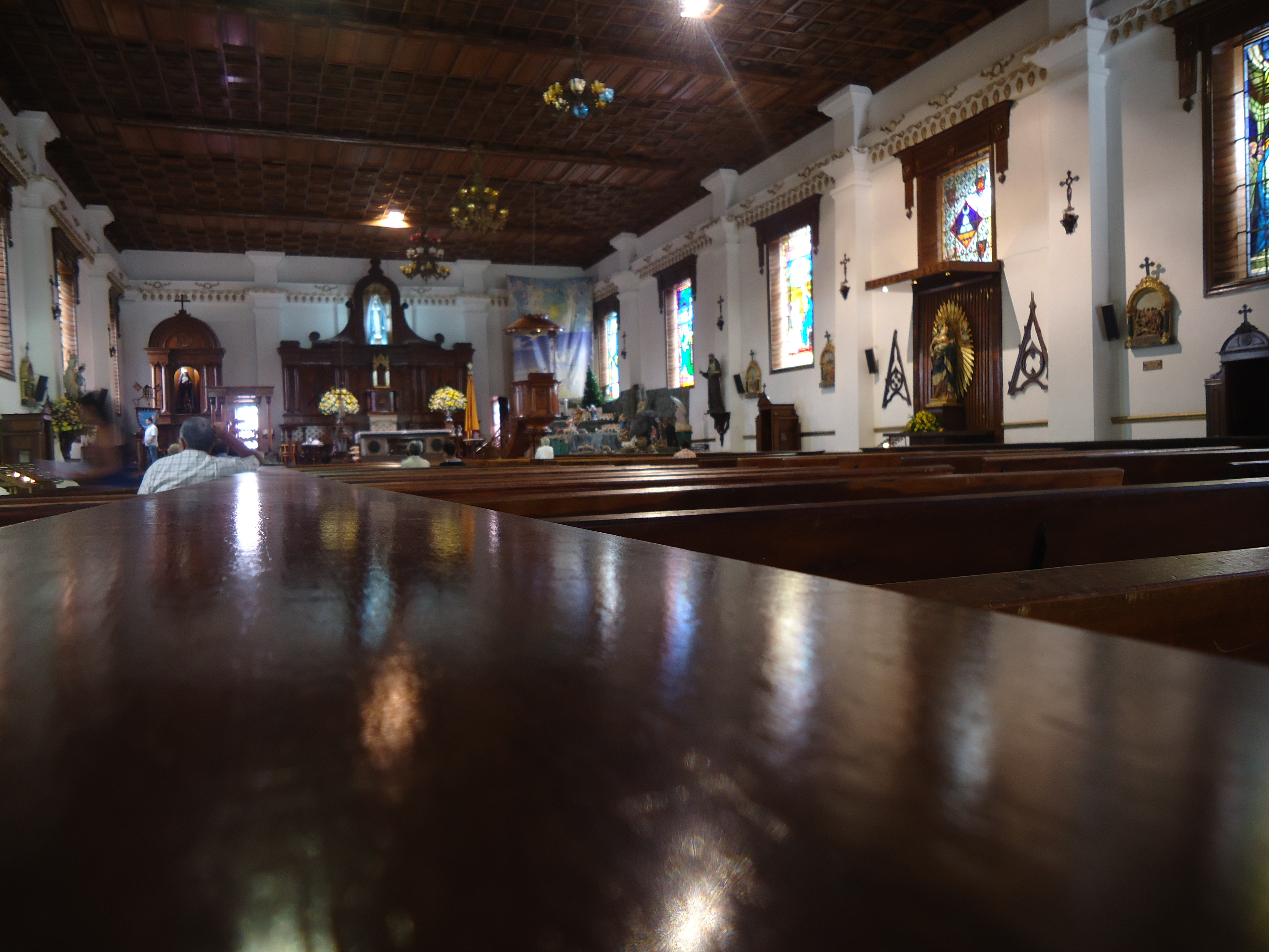 Una de las únicas iglesias tan amplias, que no tienen columnas, todo un orgullo para los salamineños.